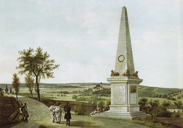 Rousínov, pomník vyrobený v blanenských železárnách připomínal místo u Slavíkovic, kde Josef II. v roce 1769 vyoral brázdu